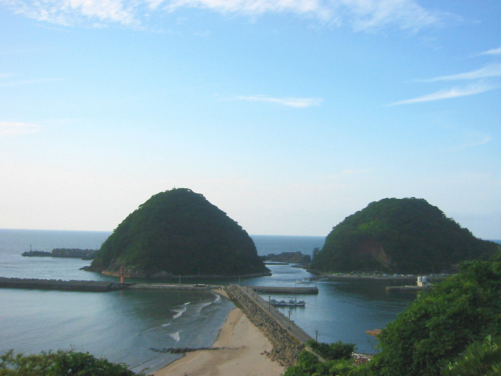 ふれあいの里 但馬丹後 みどりの一里塚(真砂光る潮騒の道)にて新温泉町居組 左側:県指定文化財の居組不動山暖地性植物群落の不動山/右側:亀山 と居組港。